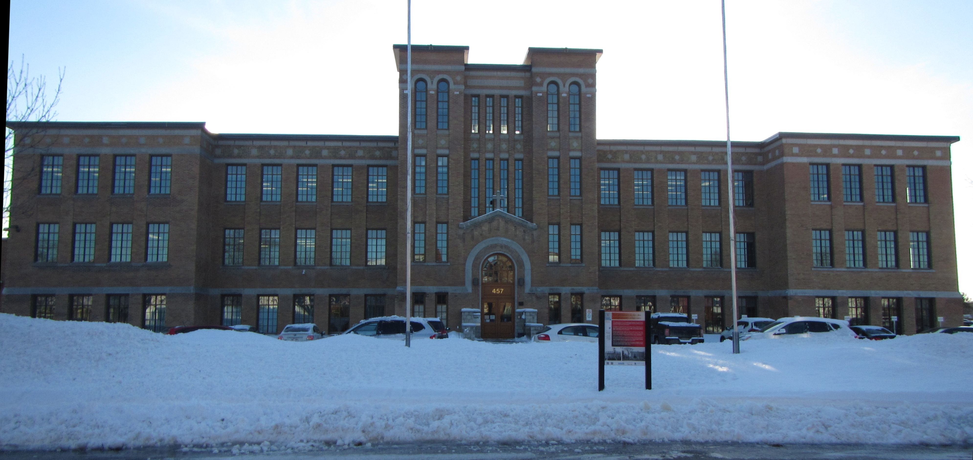 École Saint-Frédéric, au 457 rue des Écoles à Drummondville, Québec.